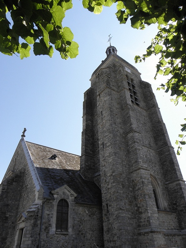 Église Saint-Médard et Saint-Michel de Villeblevin (89).